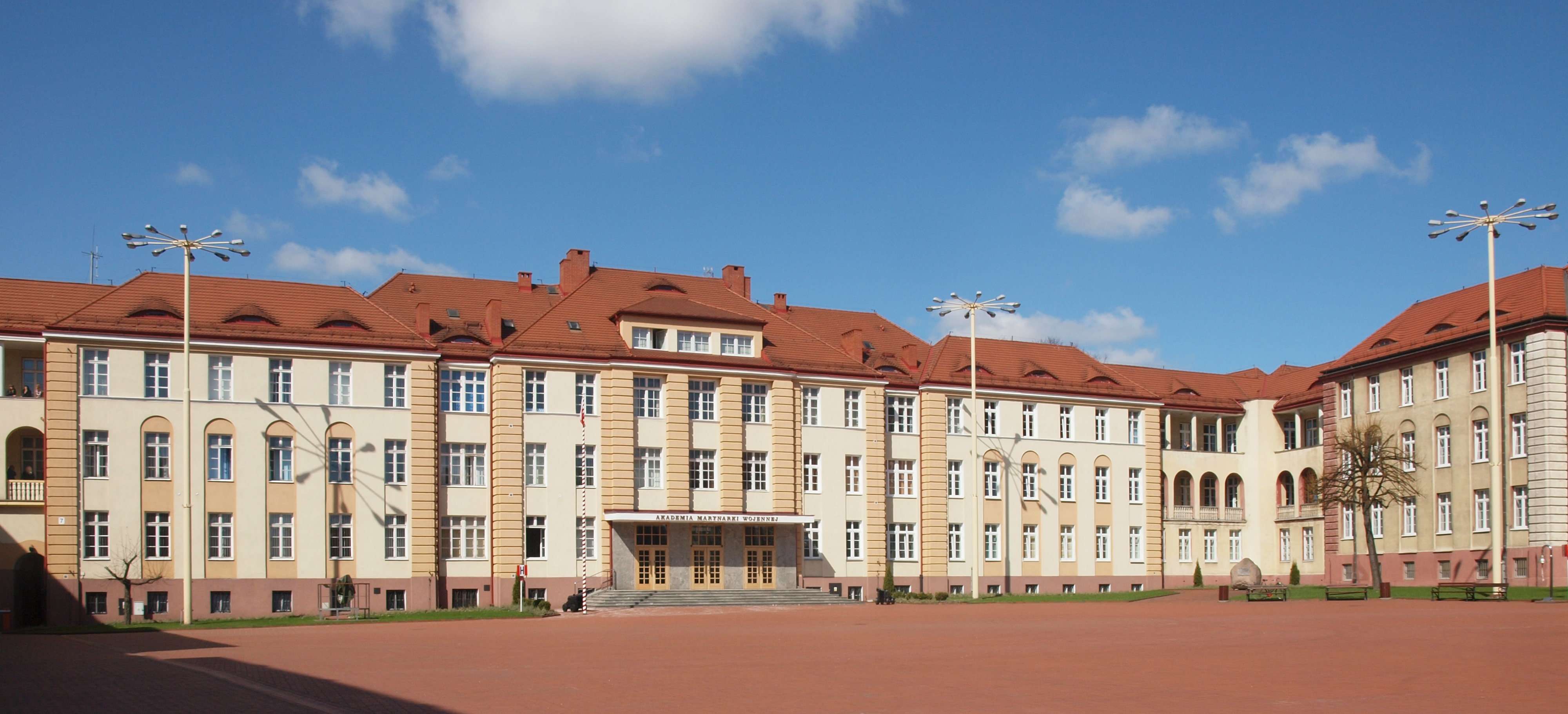 Akademia Marynarki Wojennej budynek nr 7